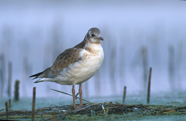 Larus ridibundus, juvenile